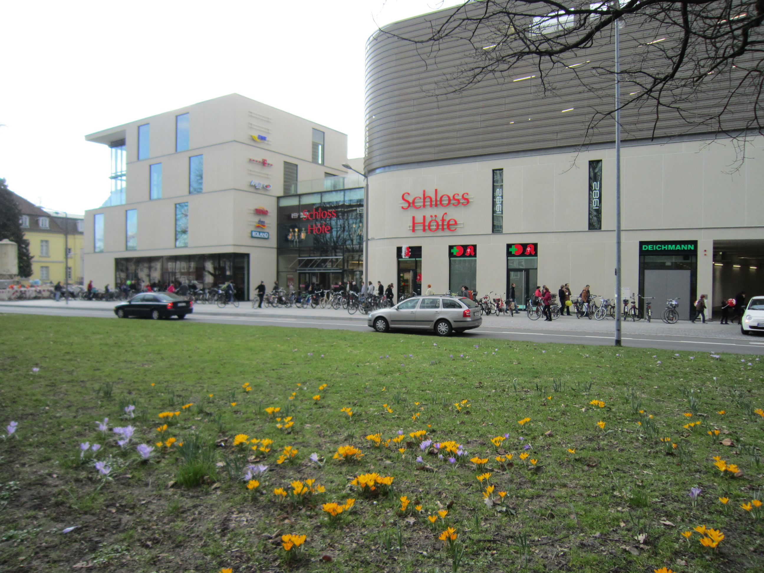 Einkaufszentrum Schlosshöfe Oldenburg. Blick auf den Eingang Poststraße von den Wallanlagen aus